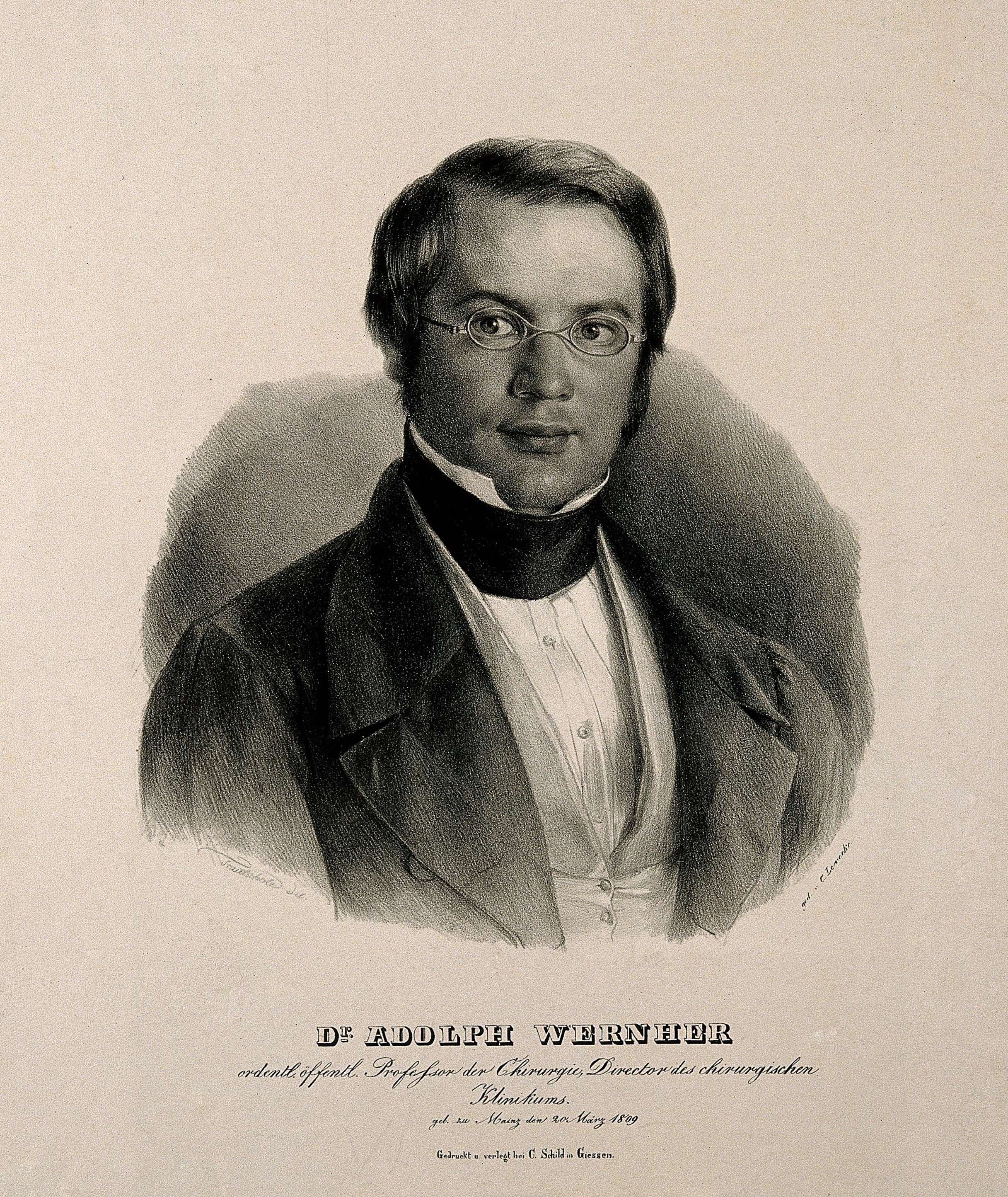 Topic-LCSH: Eyeglasses. Genre/Technique: Portrait prints. Lithographs.